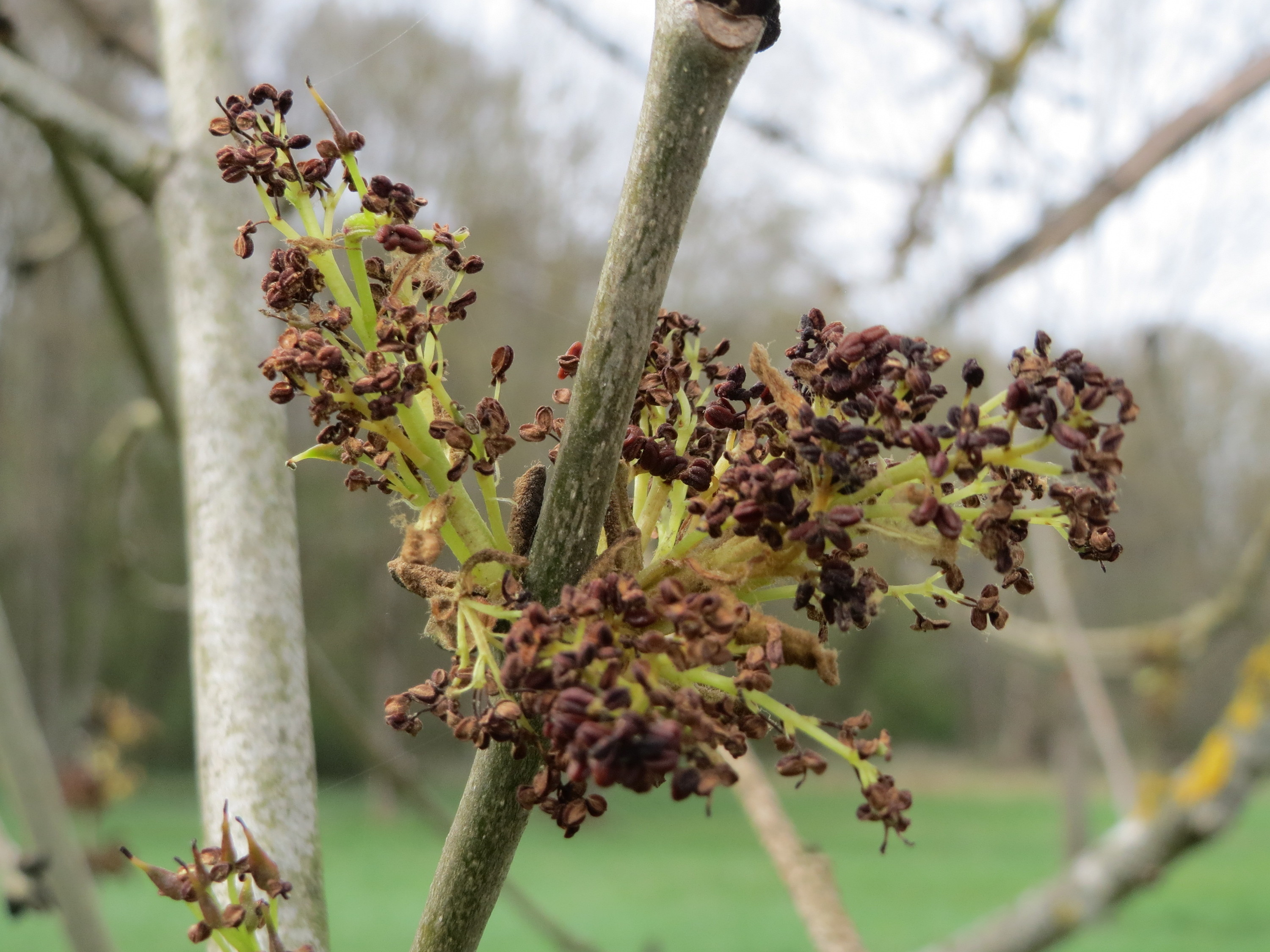 Eschenblüte (Fraxinus excelsior) an der Saar bei Grosbliederstroff